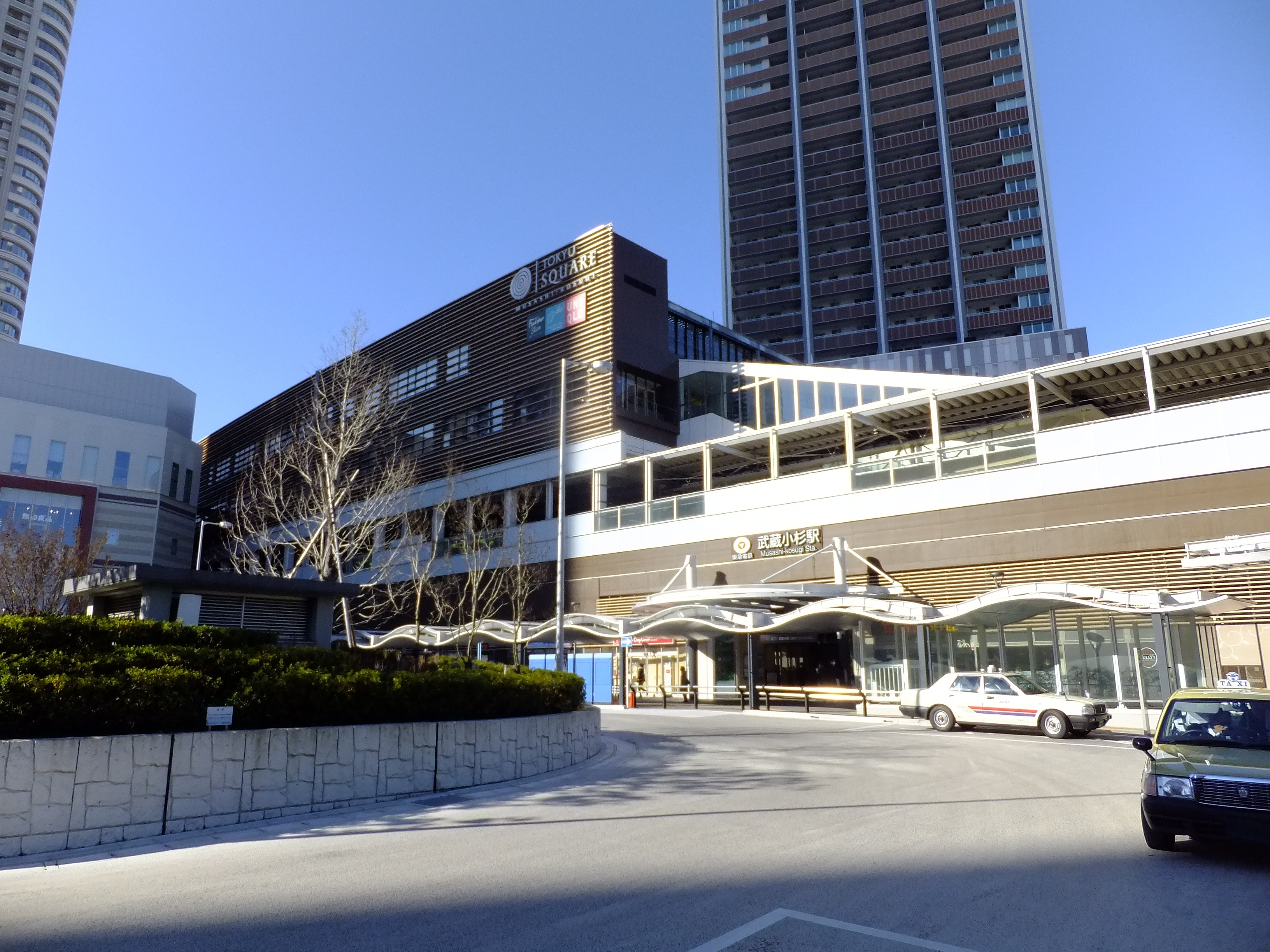 東急電鉄・武蔵小杉駅、正面入口ロータリー